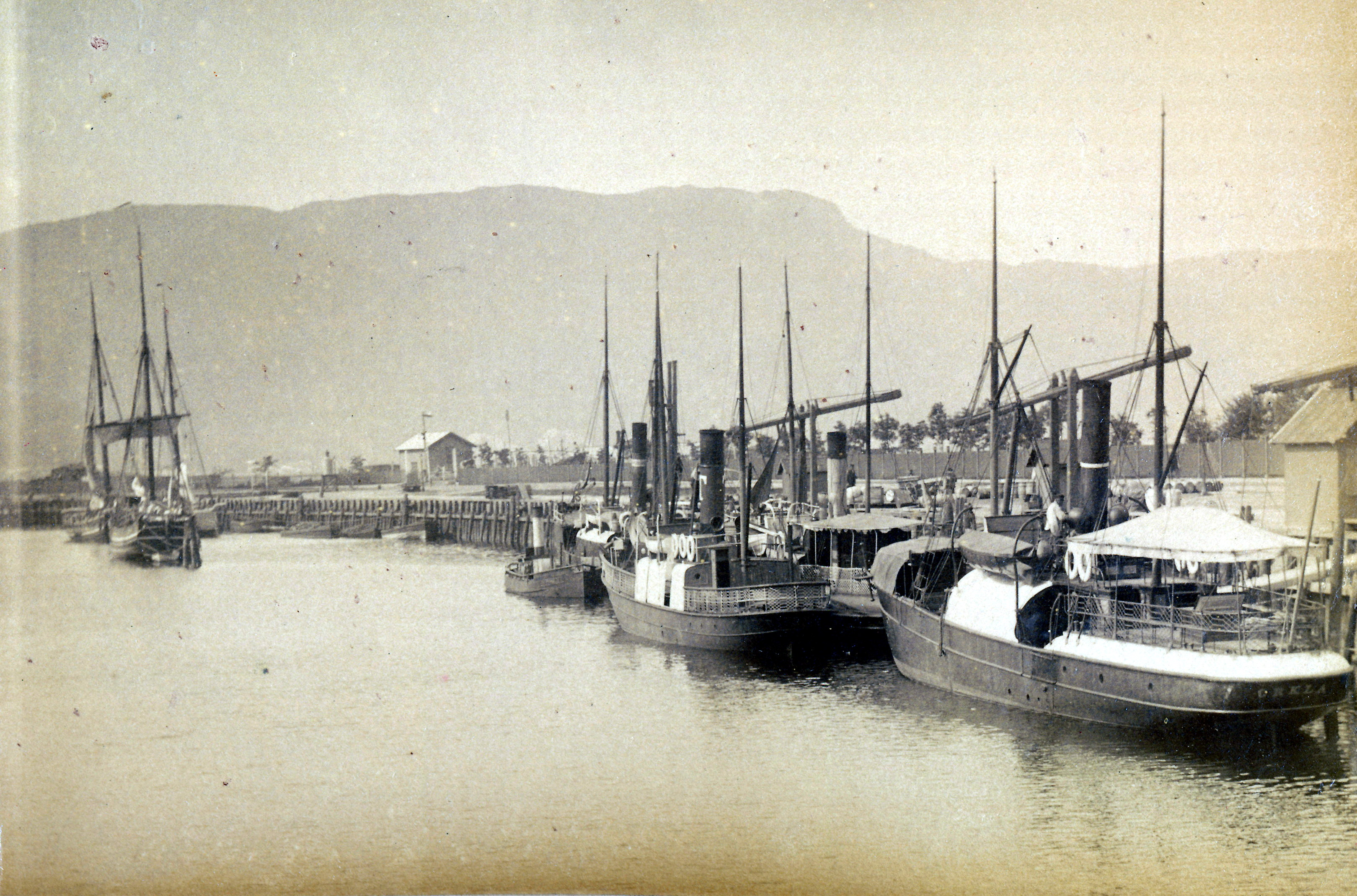 Format: Fotopositiv Dato / Date: 1893 Fotograf / Photographer: Jørgen Wickstrøm Sted / Place: Brattøra, Trondheim Lenke / Link: Se diskusjonen rundt de to fotografene Johan Erik Wickstrøm og Jørgen Johan Brock Wickstrøm (Preus Museum) Litteratur: Trondhjemske Samlinger: 1893 - et år i Trondhjem. Bilder av Jørgen Wickstrøm (Trondheim 2001) Eier / Owner Institution: Trondheim byarkiv, The Municipal Archives of Trondheim Arkivreferanse / Archive reference: Tor.H40.B24.F1667 [T0104] Fra Havna. Nærmest ligger D/S "Orkla". I midten ytterst, M. Thams & Co. sin båt "Bjørnen". Bak den ligger en Namsosbåt. Ytterst den lille isbryteren til havnevesenet.